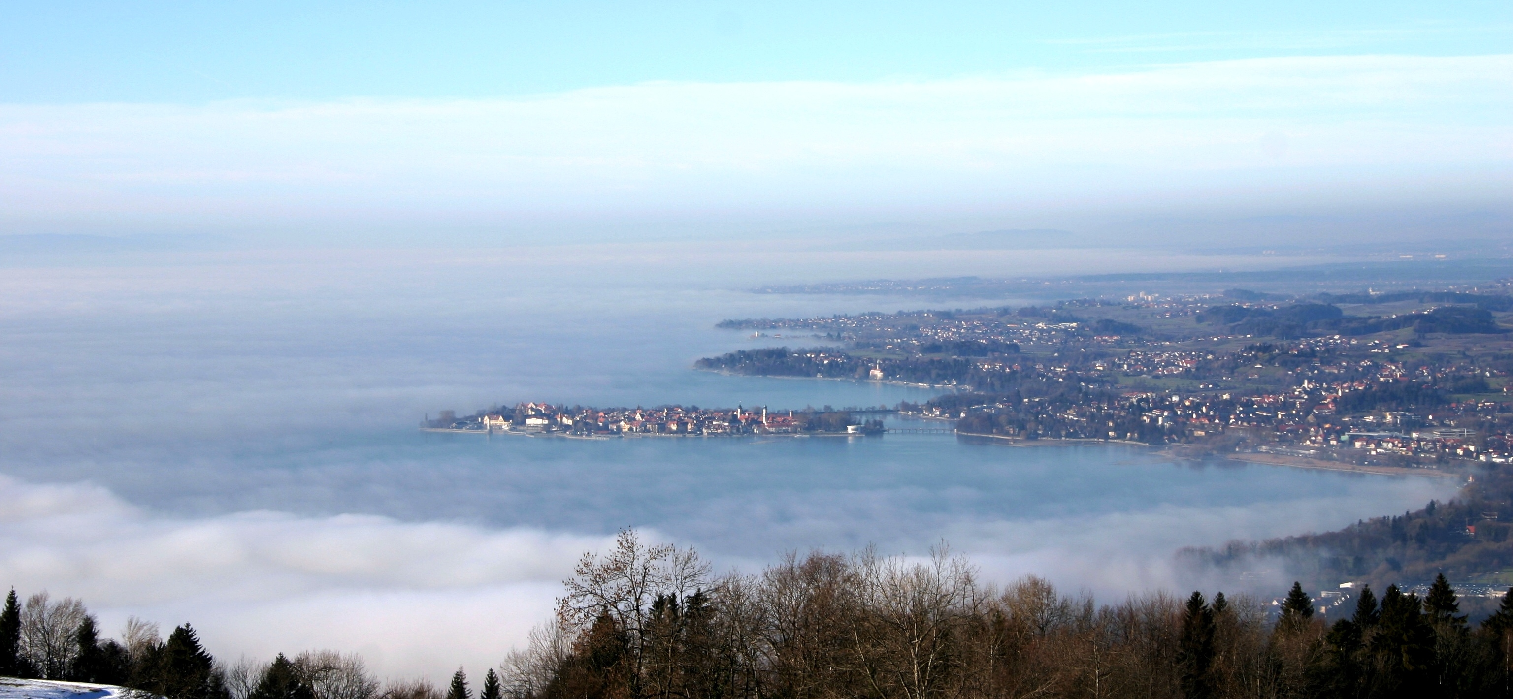 Bodensee a Lindauinsel.